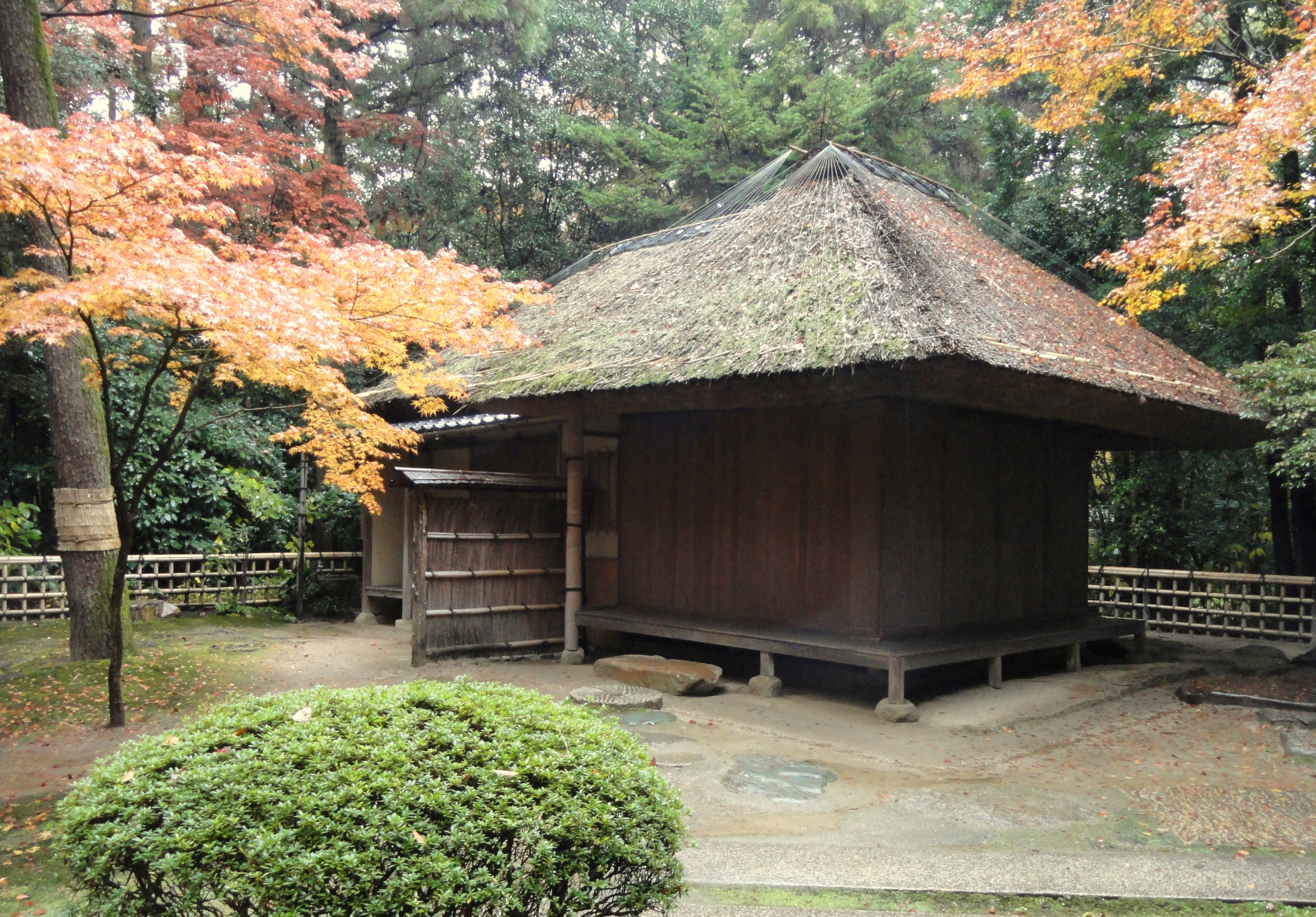 Korakuen, Okayama City, Okayama, Japan.